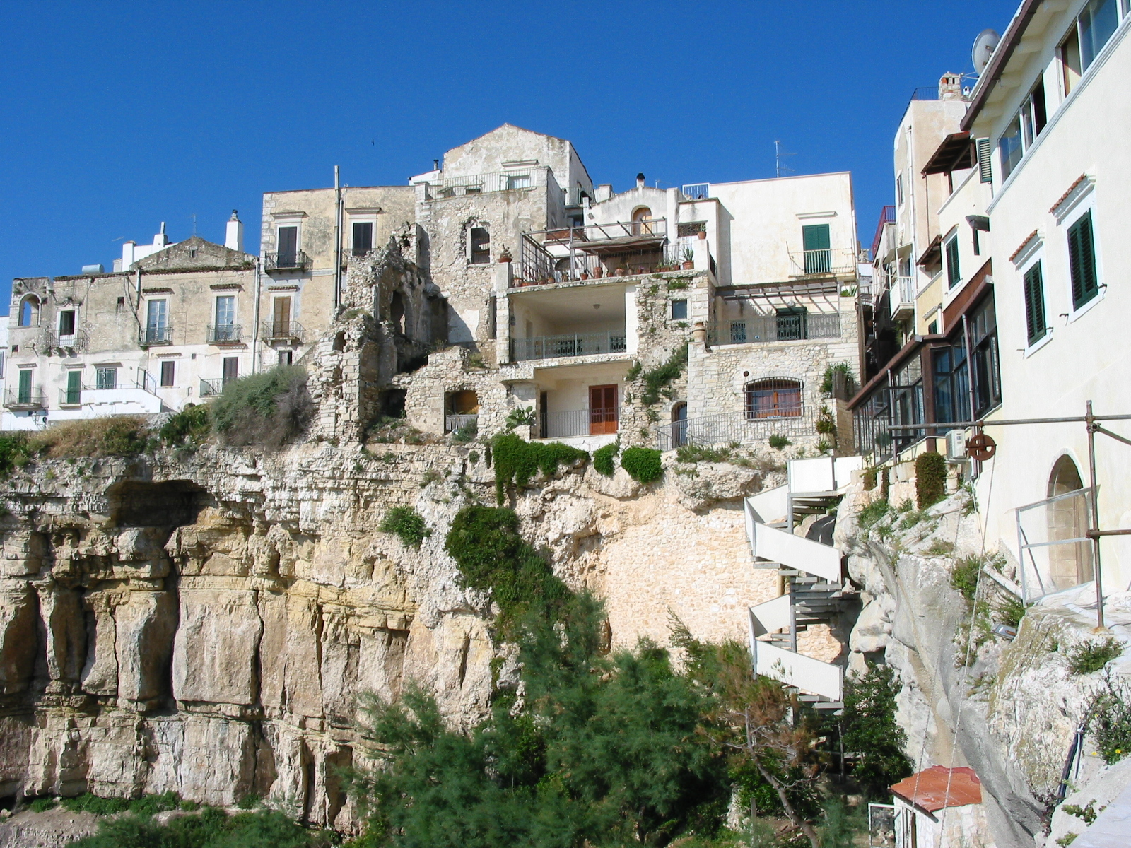 Vieste, Puglia, ItaliaVieste, Gargano